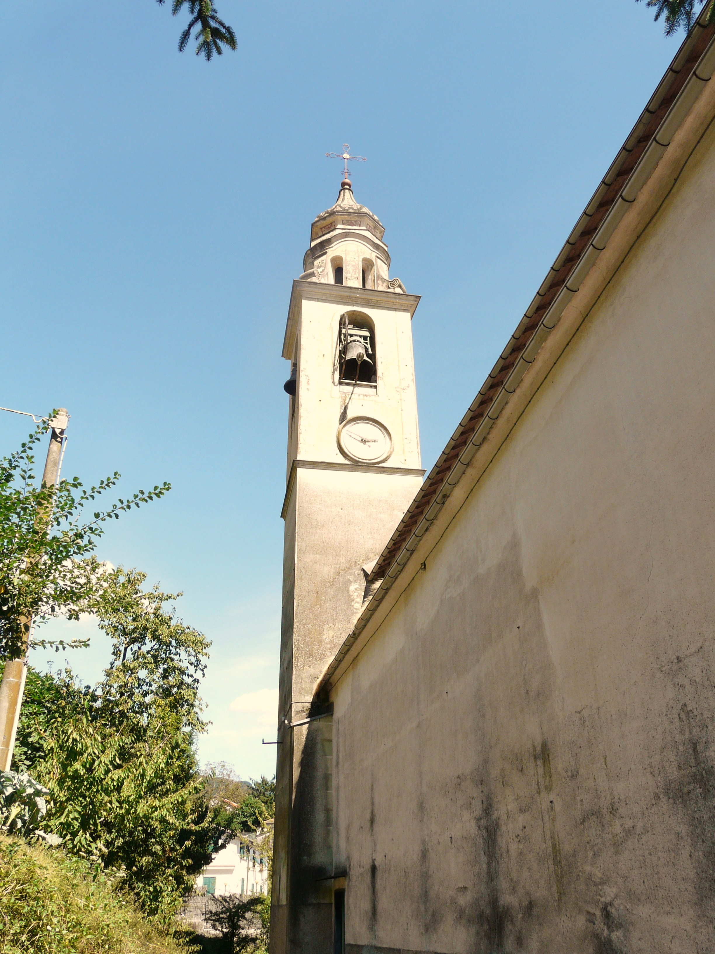 Campanile della Chiesa di Santa Maria Maddalena, Lumarzo, Liguria, Italia